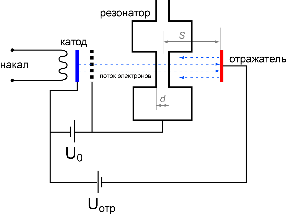 Схема отражательного клистрона